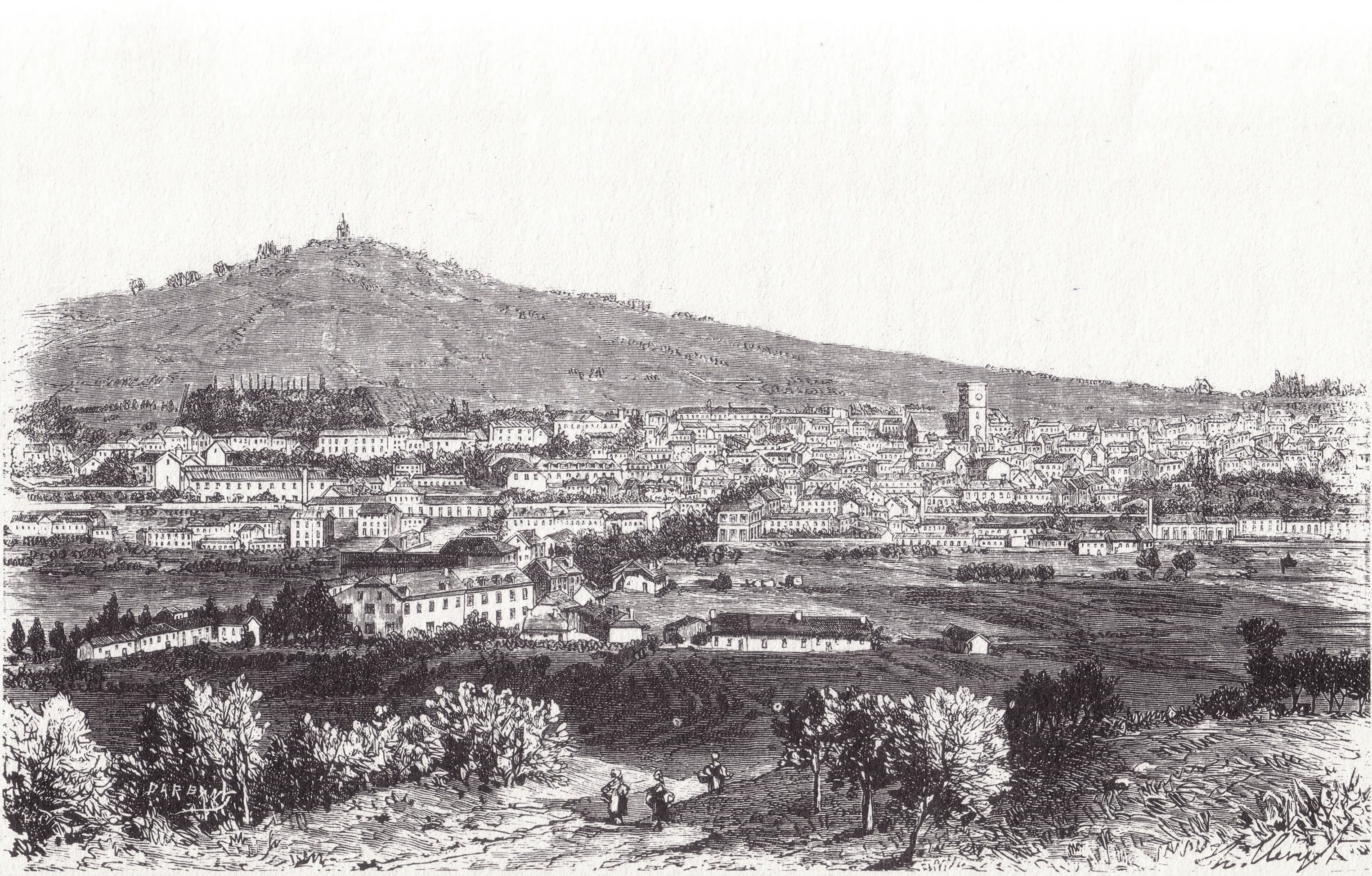 Vue sur le centre de Vesoul, gravure du XIXème siècle.